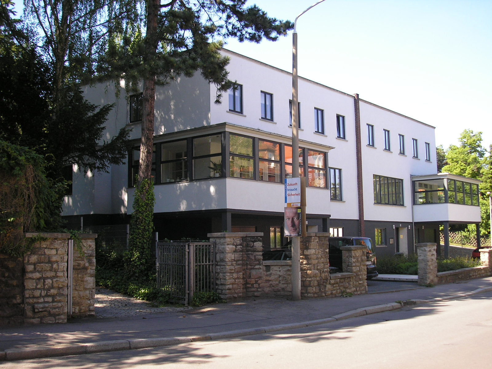 Ein Gebäude im Stil des Bauhauses in der Cyriakstraße in Erfurt.